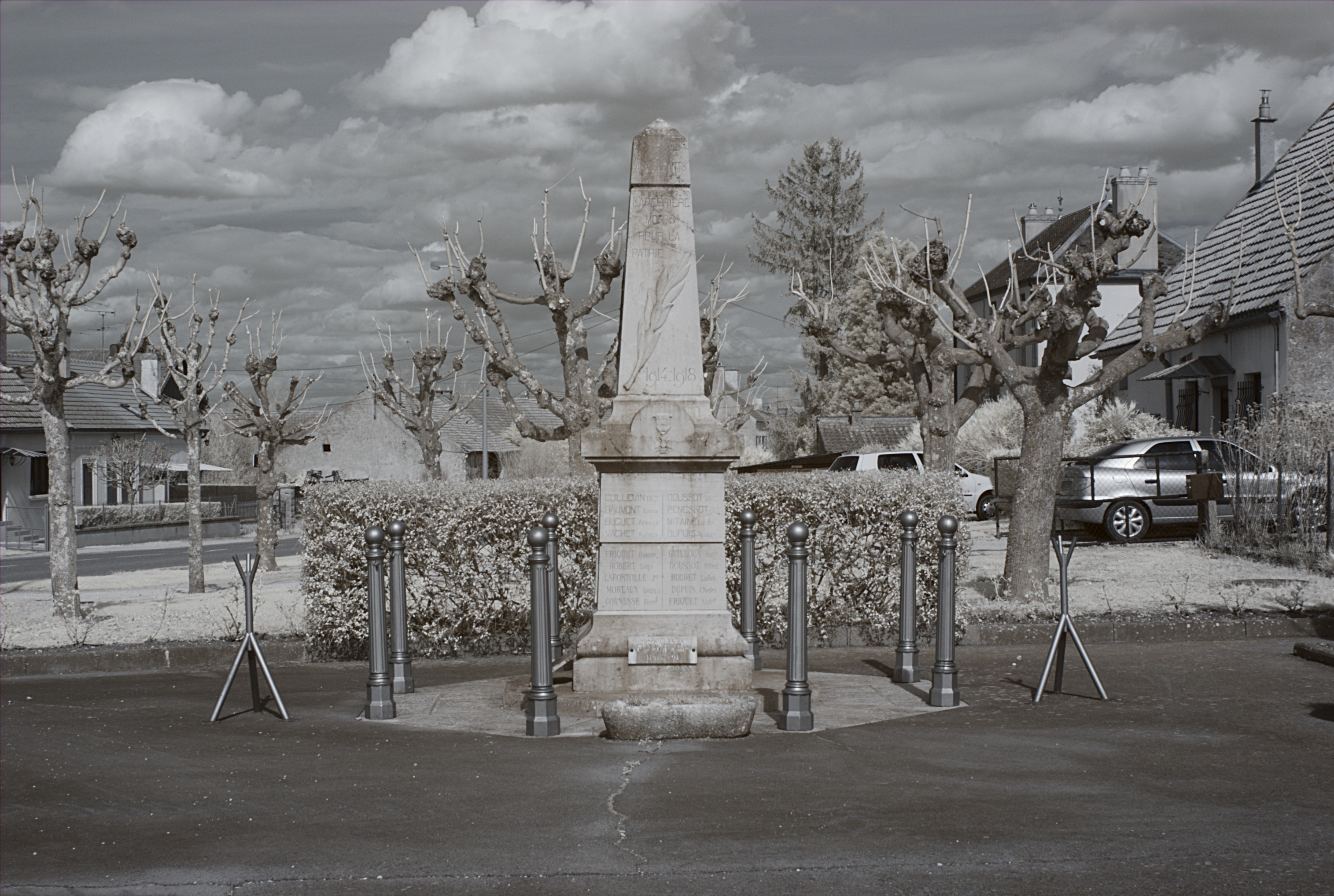 Monument aux morts, Laperrière-sur-Saône (Côte d'Or, Bourgogne, France) photographié avec un filtre infrarouge 720 nm.